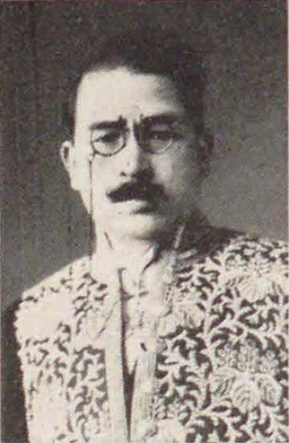 松本君平（1870-1944）